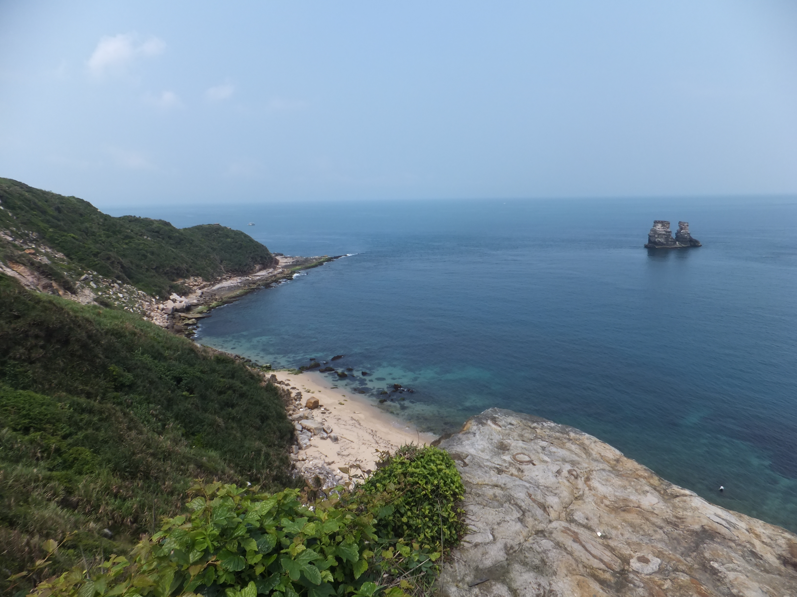 中文（台灣）: 燭臺雙嶼遠景